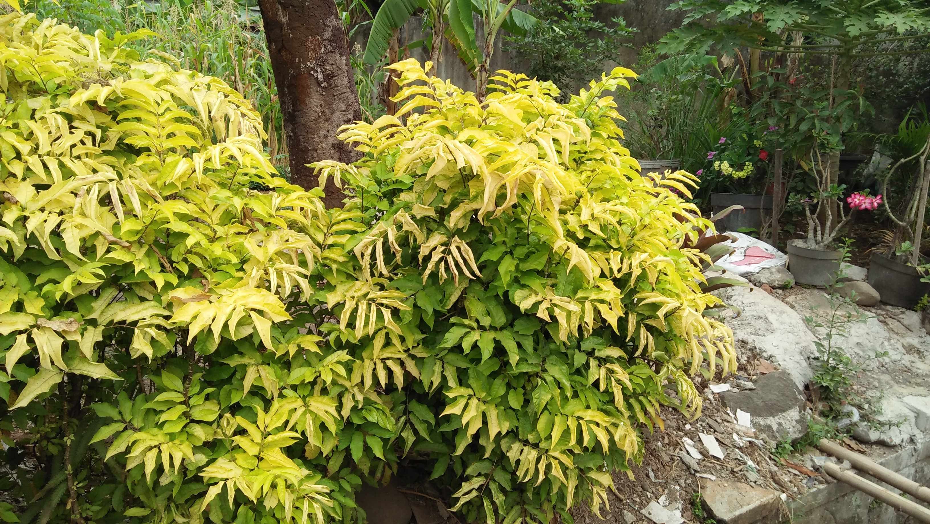 Daun berlangkas adalah tanaman perdu.